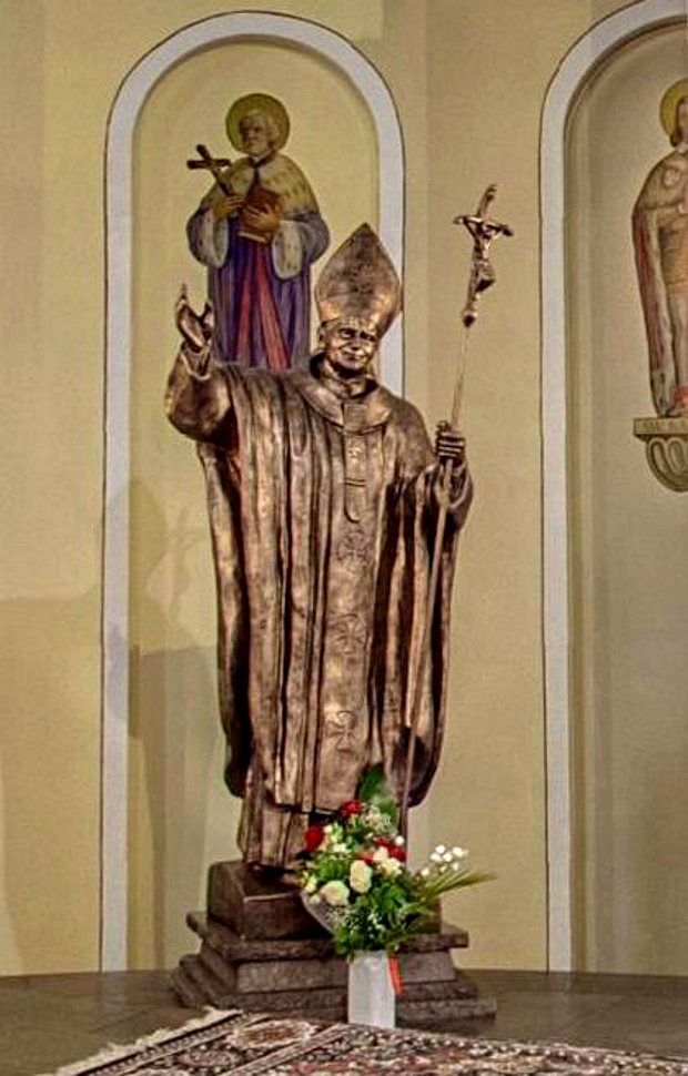 Pomnik św. Jana Pawła II w prezbiterium kościoła Imienia Maryi w Bączalu Dolnym